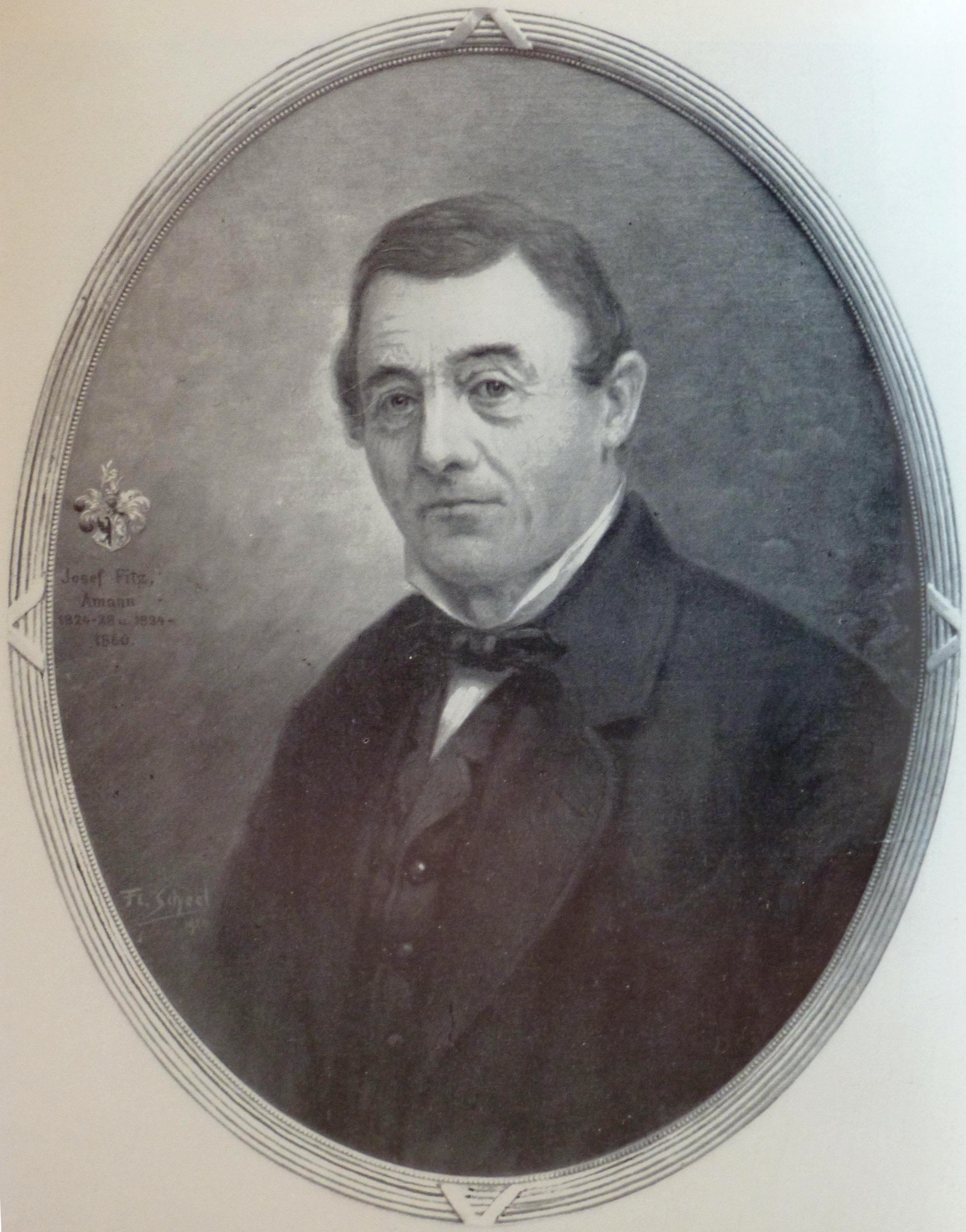 Bildnis des Lustenauer Gemeindevorstehers Josef Fitz